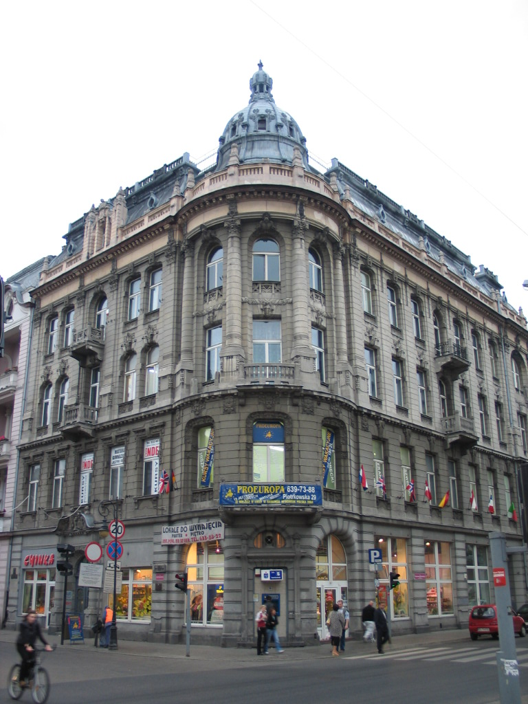 Dom bankowy Wilhelma Landaua przy Piotrkowskiej 29 w Łodzi